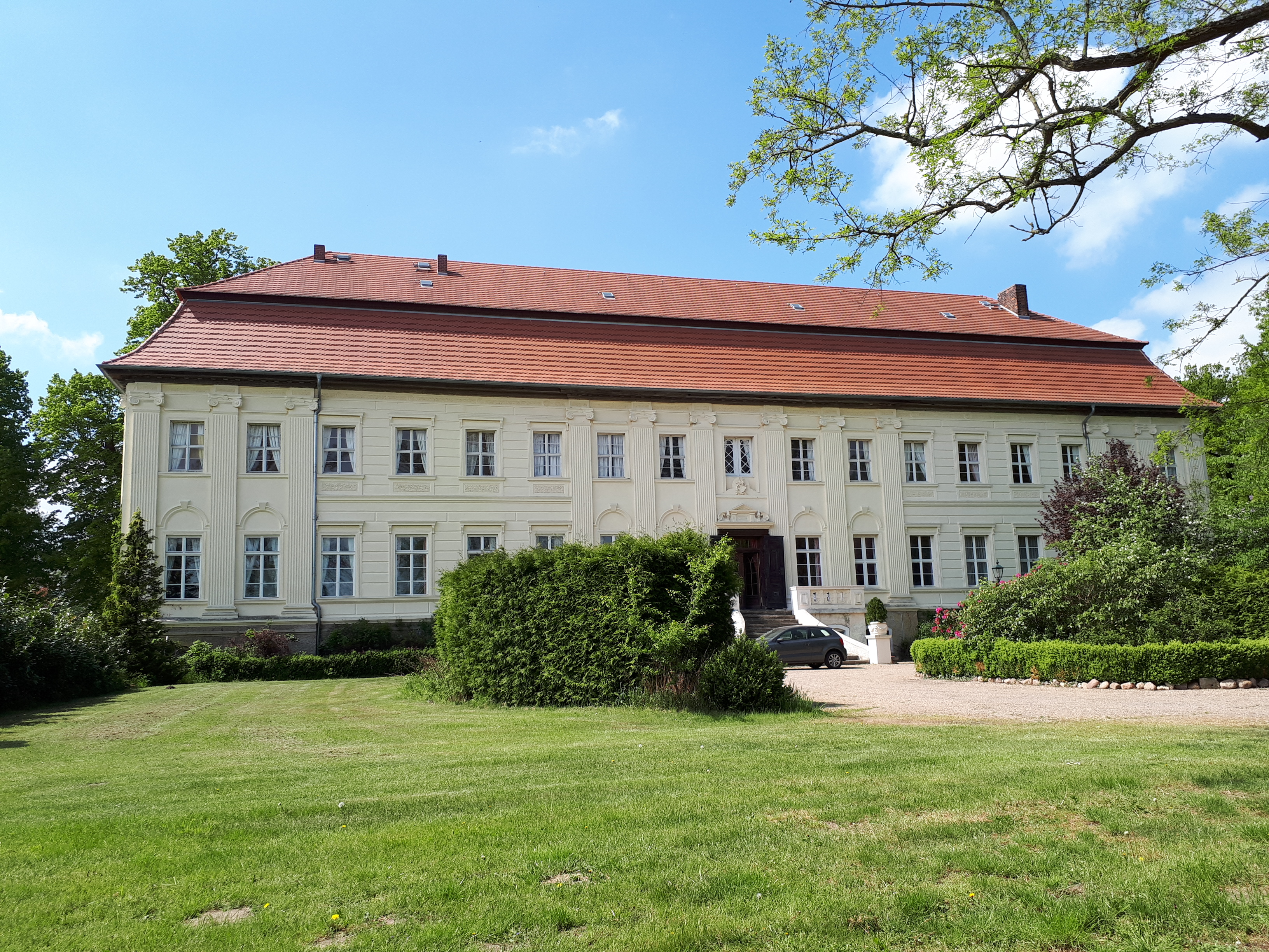 Schloss Dretzel Vorderseite